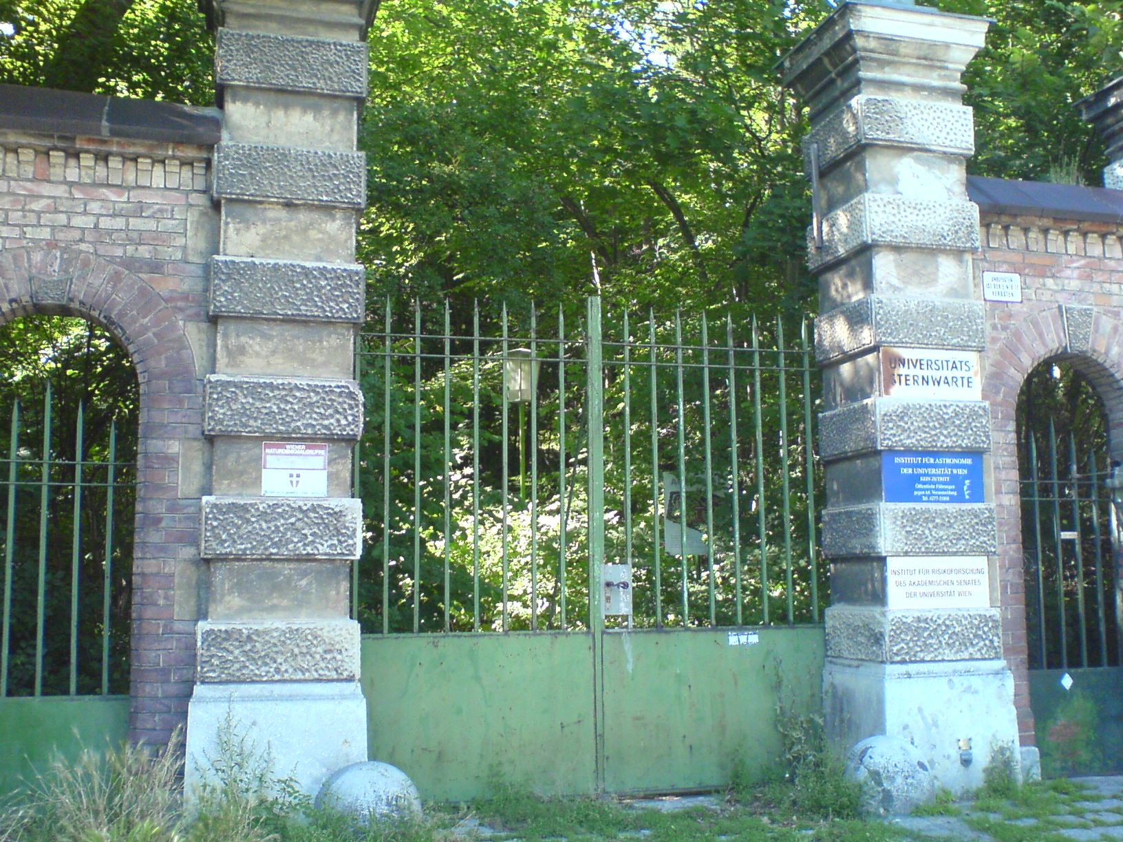 Eingang zum Sternwarteareal der Wiener Universitätssternwarte